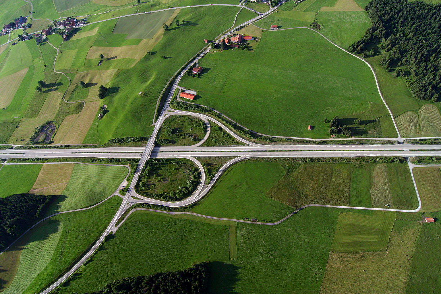 Bundesautobahn 7, Ausfahrt 138 "Nesselwang"